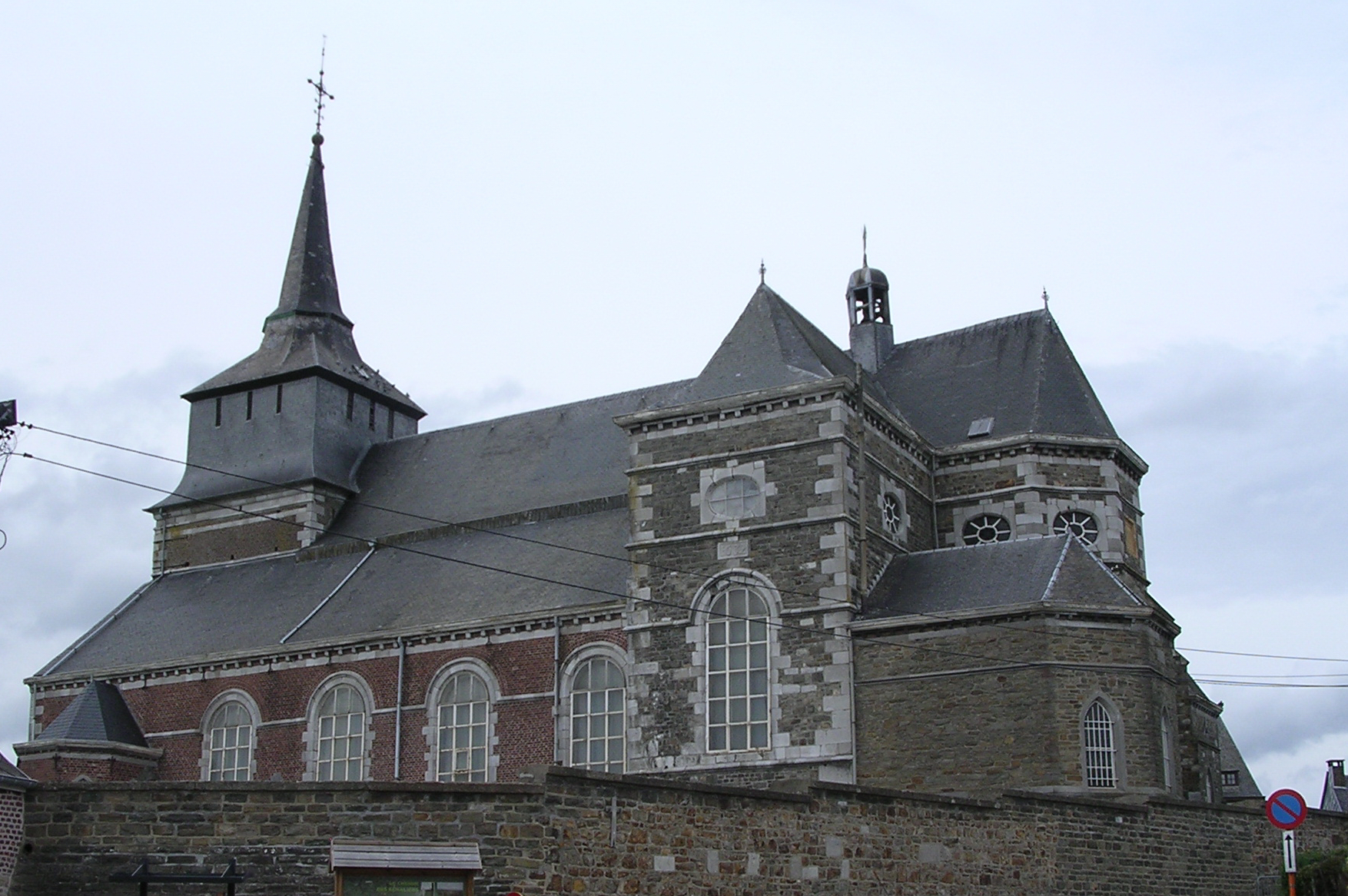 vue extérieure